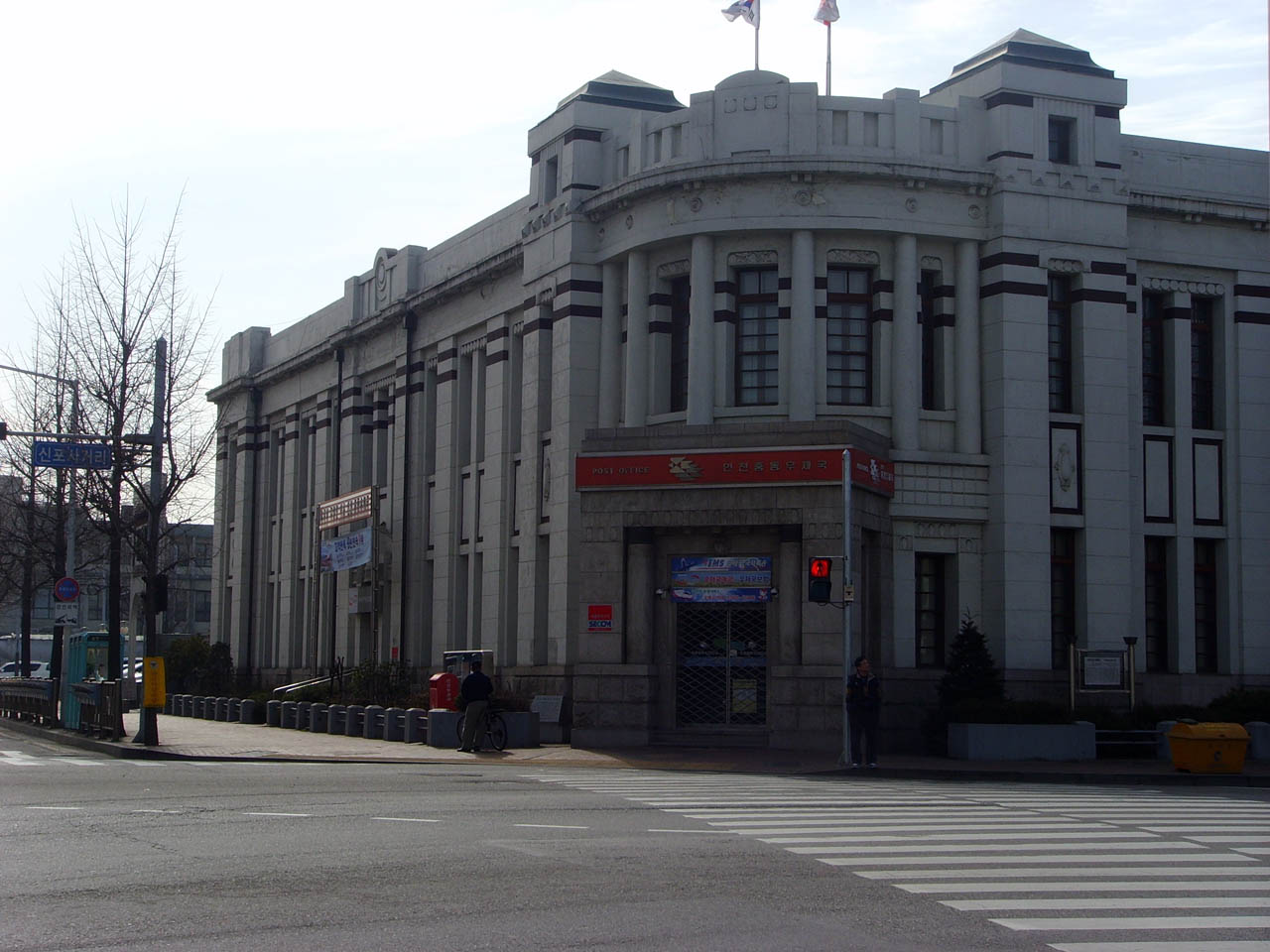 인천광역시 중구에 있는 인천중동우체국